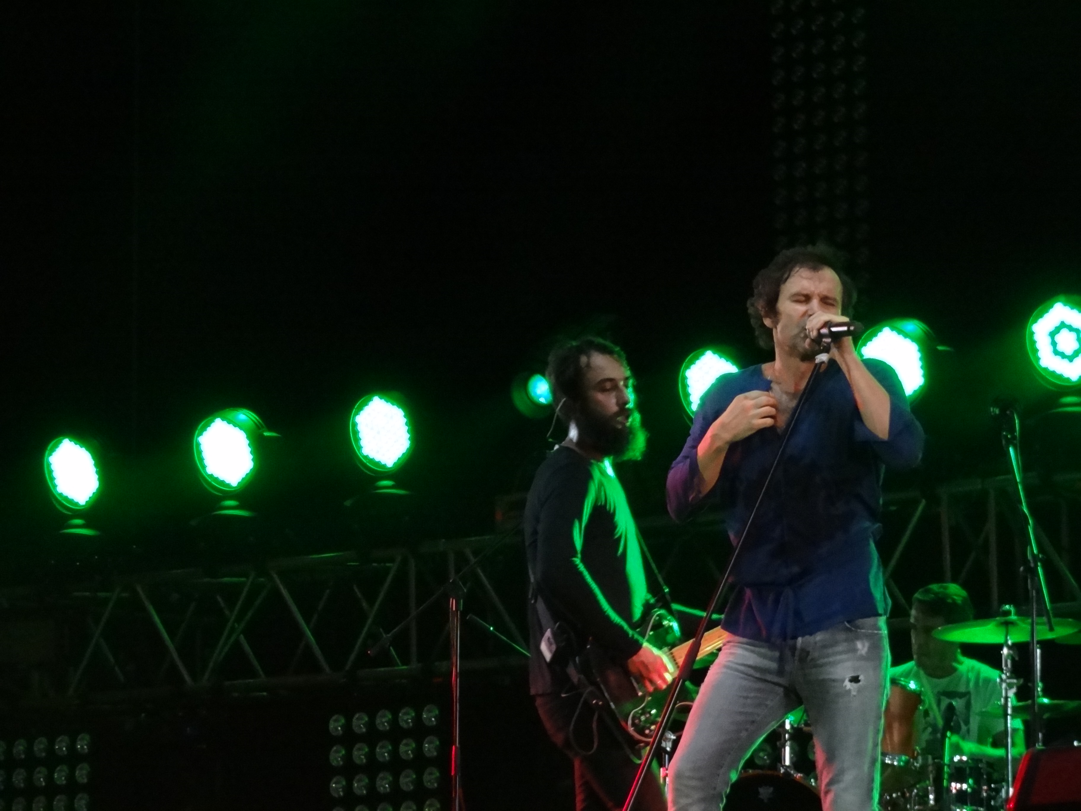 Концерт в рамках XI Международного инвестиционного форума «Сочи – 2012» .